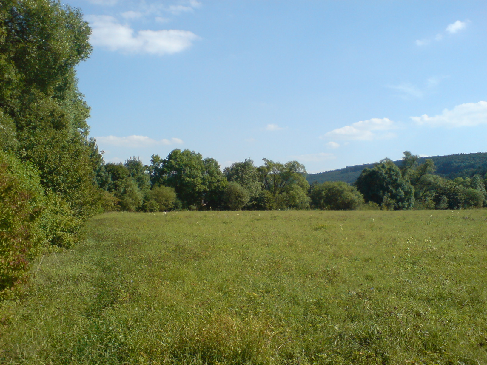 Jagstaue bei Möckmühl